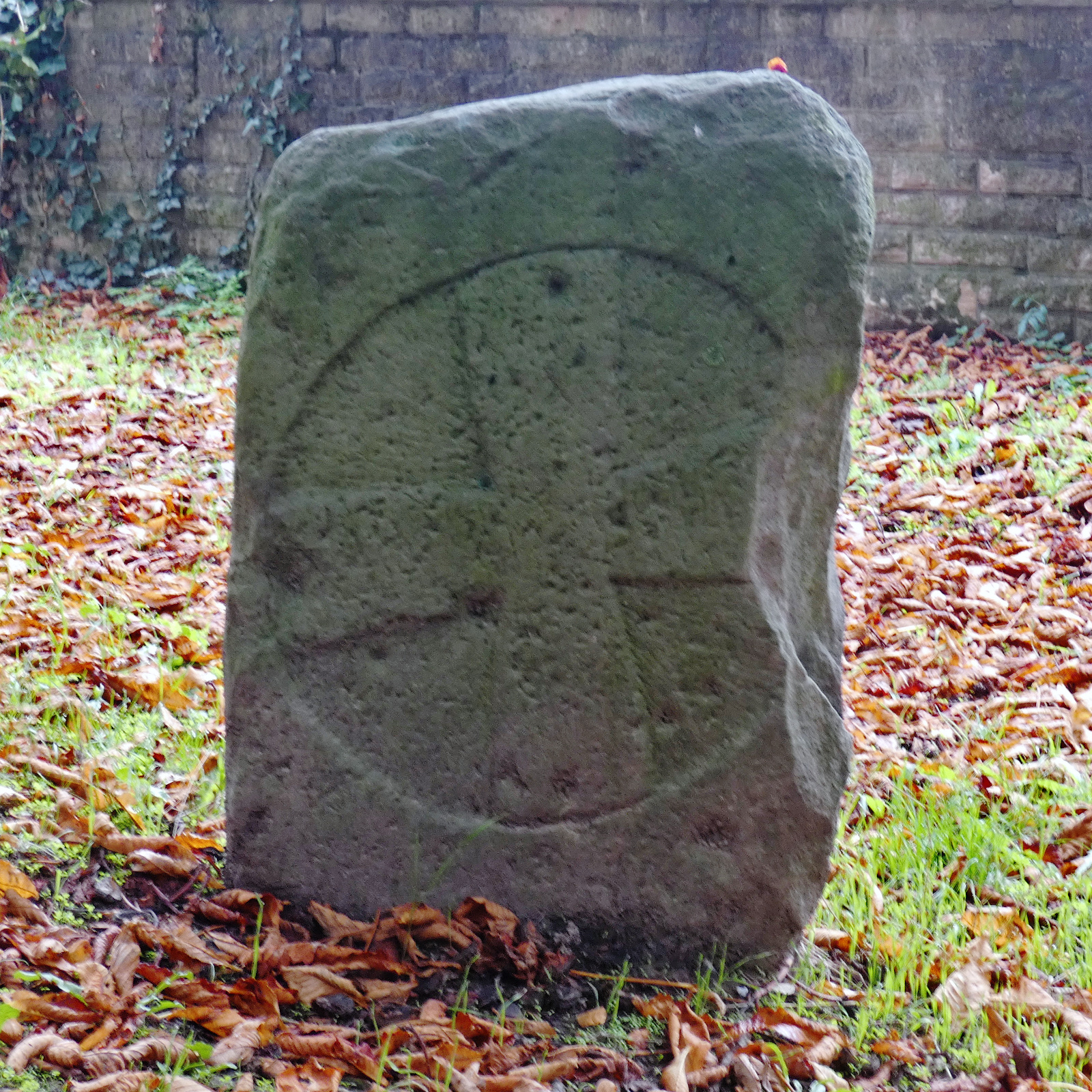 Die Kreuzsteine, oder früher die 5 Steine, sind eine Gruppe von Kreuzsteinen in Hiddestorf, einem Stadtteil von Hemmingen in der Region Hannover in Niedersachsen